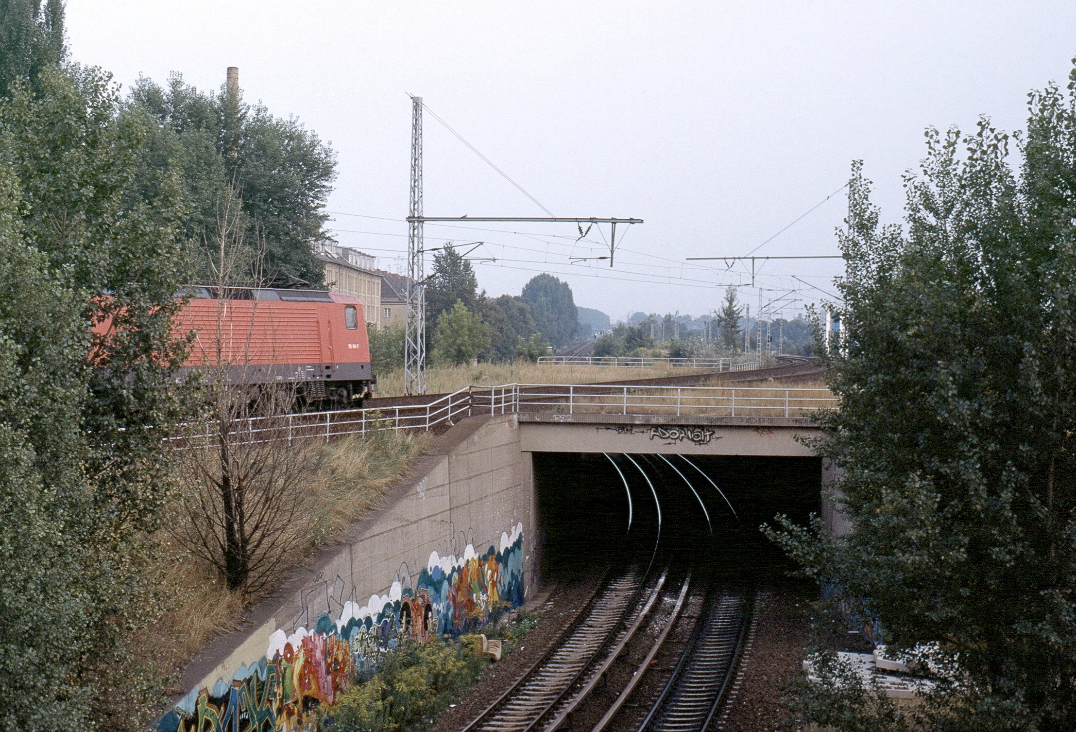 Anfang der Bahnstrecke Berlin-Görlitz in Berlin-Treptow